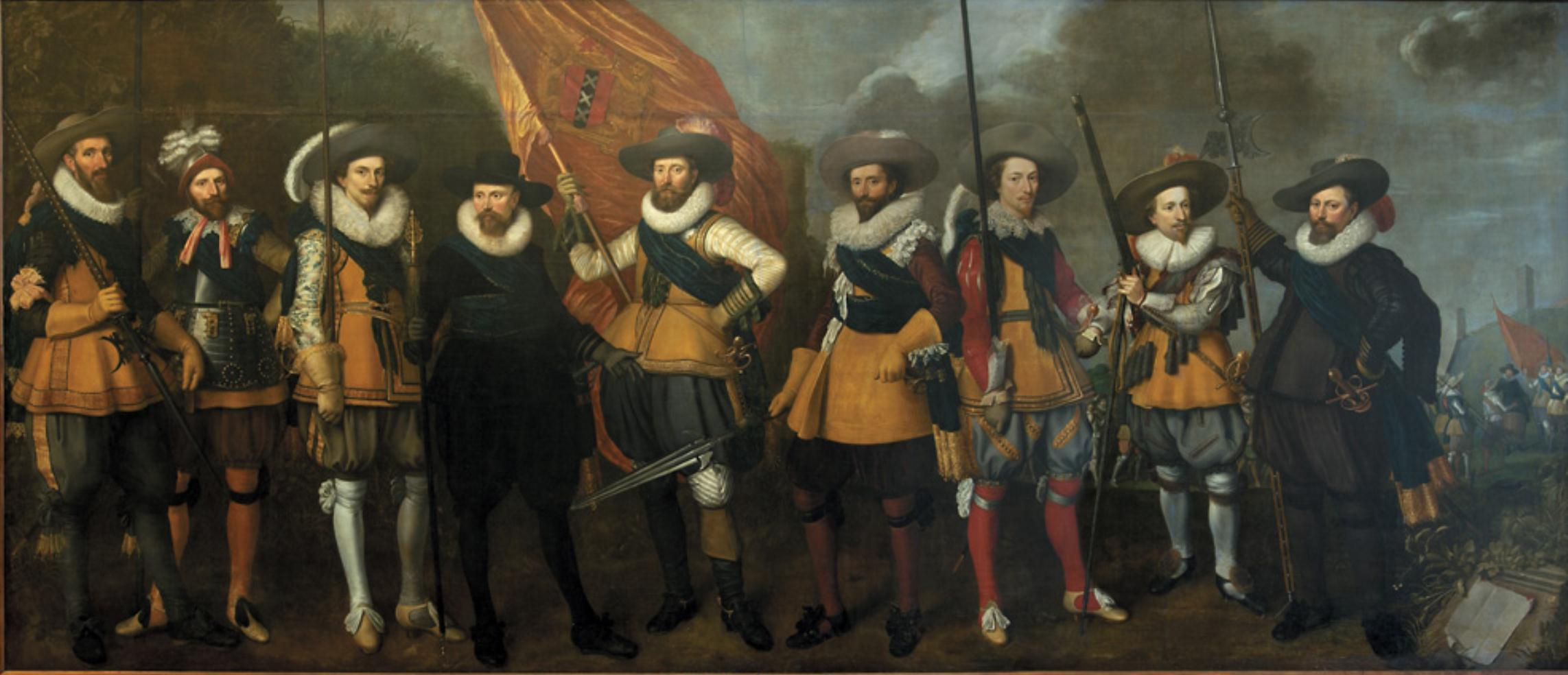 Schutters van het vendel van kapitein Abraham Boom en luitenant Oetgens van Waveren, 1623title QS:P1476,nl:"Schutters van het vendel van kapitein Abraham Boom en luitenant Oetgens van Waveren, 1623" label QS:Lnl,"Schutters van het vendel van kapitein Abraham Boom en luitenant Oetgens van Waveren, 1623"